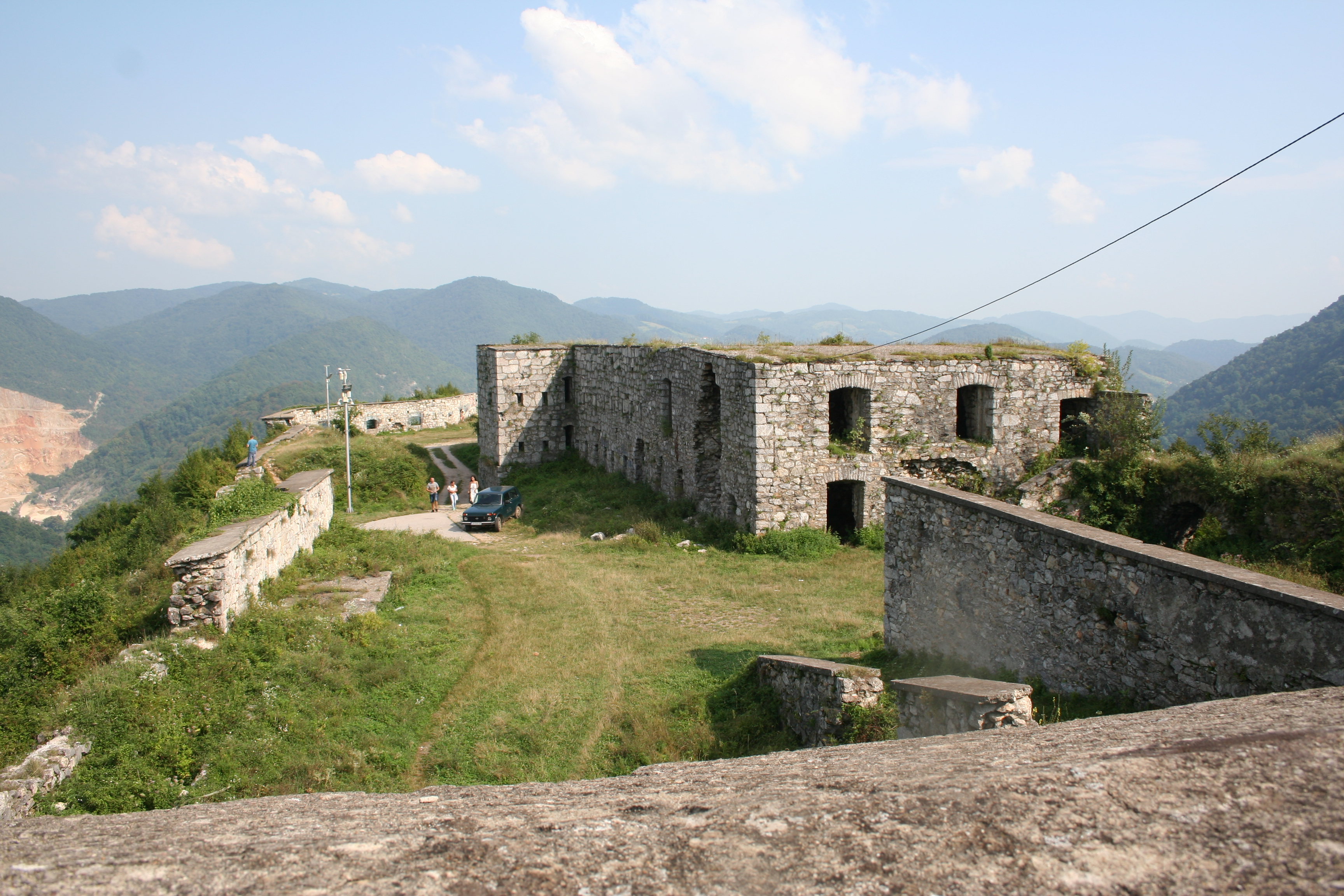 Stari grad Zvornik NKD390